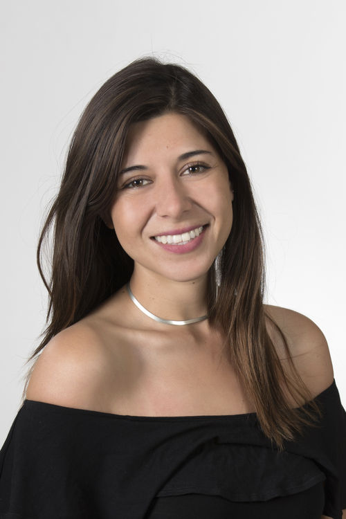 Daniella Cicardini Milla en la fotografía oficial de diputados periodo 2018-2022. (Fotos: Christel Andler, René Lescornez, Johanna Zárate)